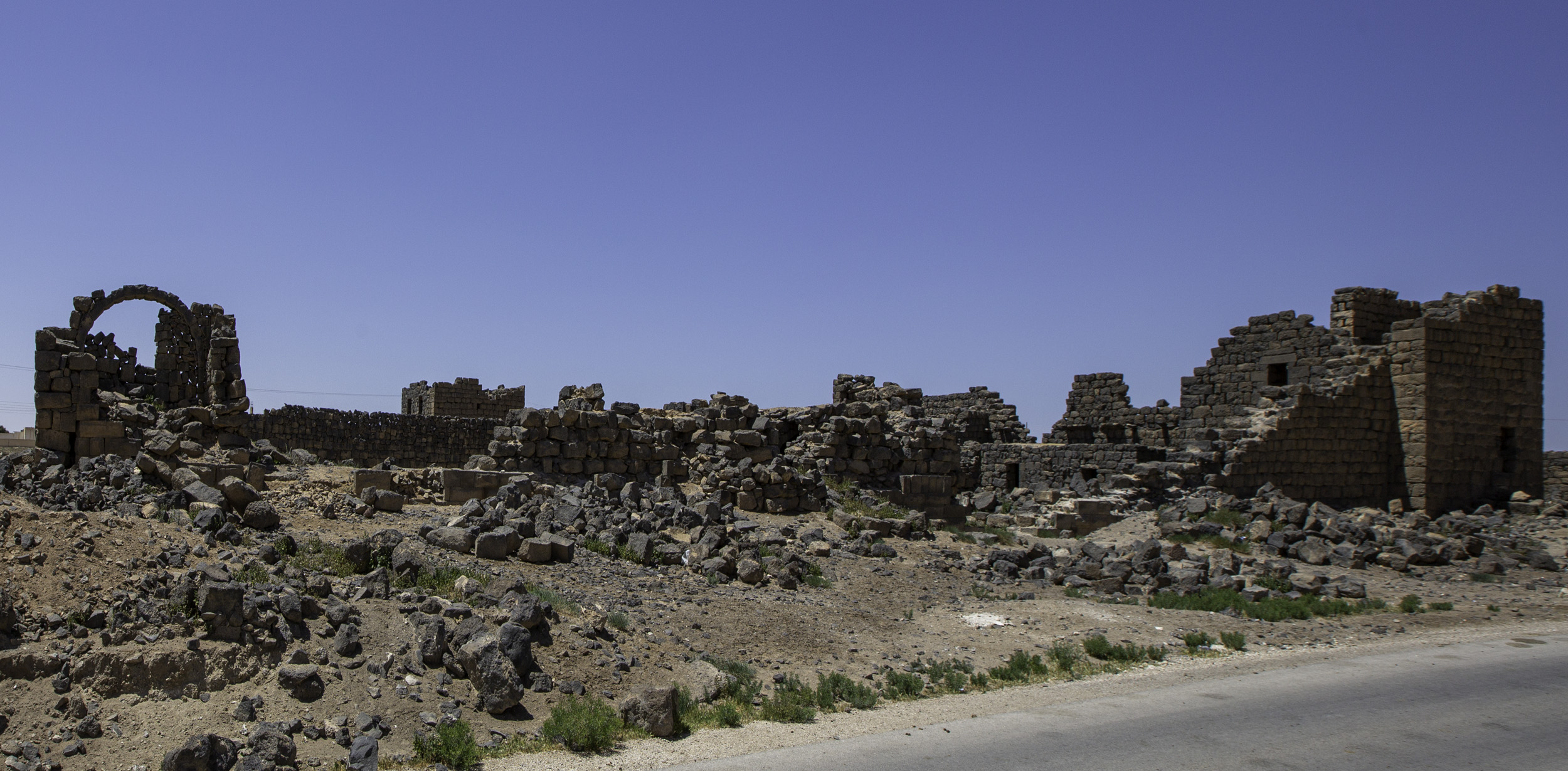 Qasr Deir Al Kahf